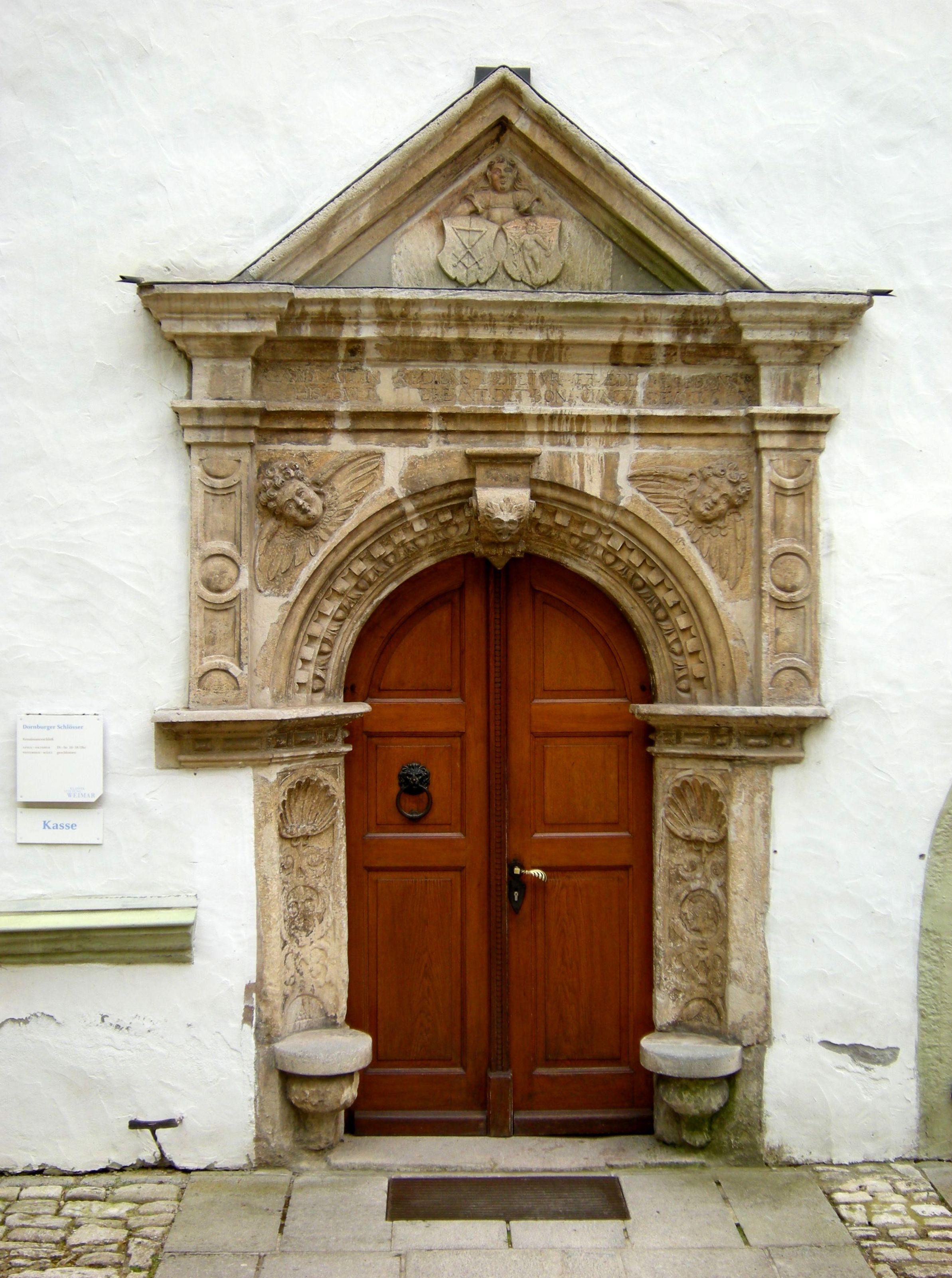 Dornburg - Renaissance-Eingangstüre am Schloss.jpg